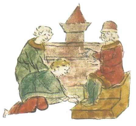 Беларуская (тарашкевіца): Фрагмэнт мініятуры Радзівілаўскага летапісу: Пачатак княжаньня Ўсяслава Брачыславіча ў Полацку